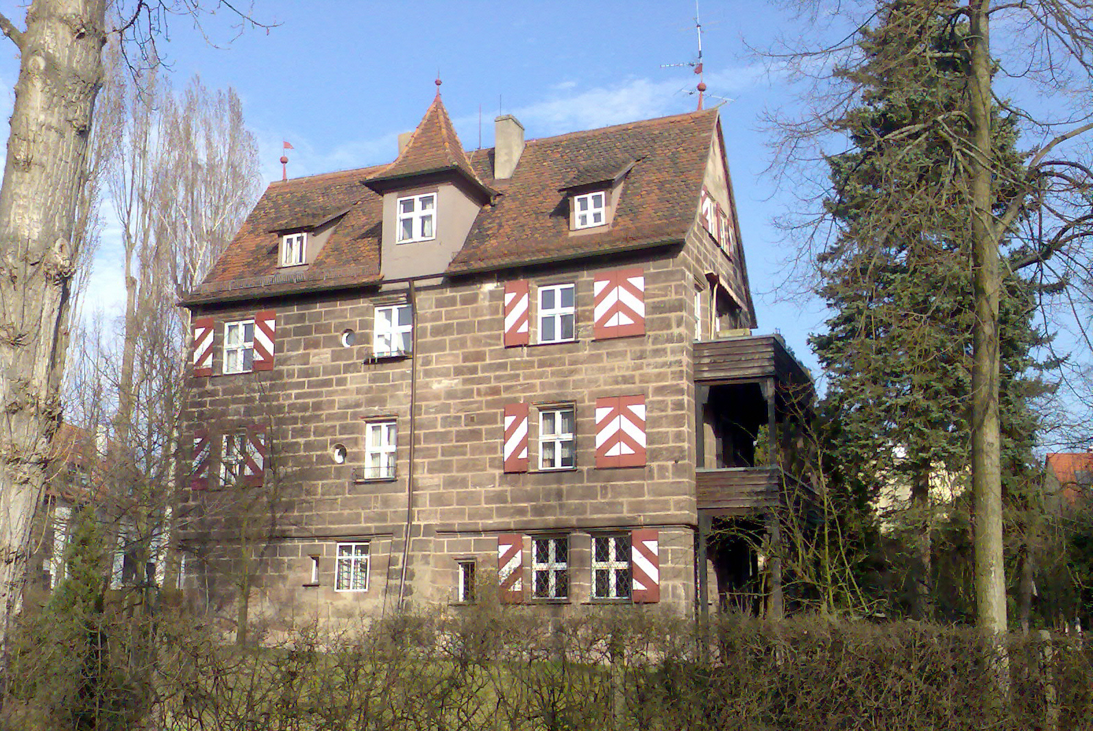 Herrensitz Schübelsberg - Westseite, Nürnberg, Bismarckstraße 36